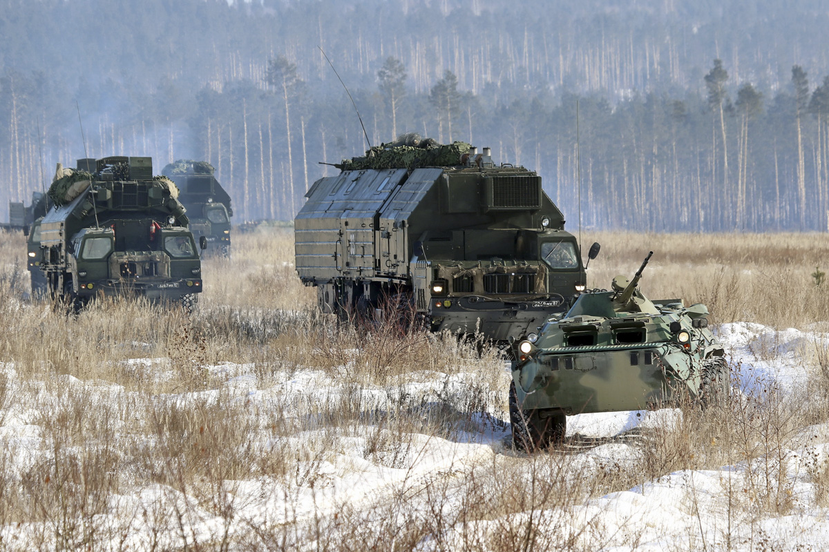 Полевой выход 29-й гвардейской ракетной Витебской дивизии.